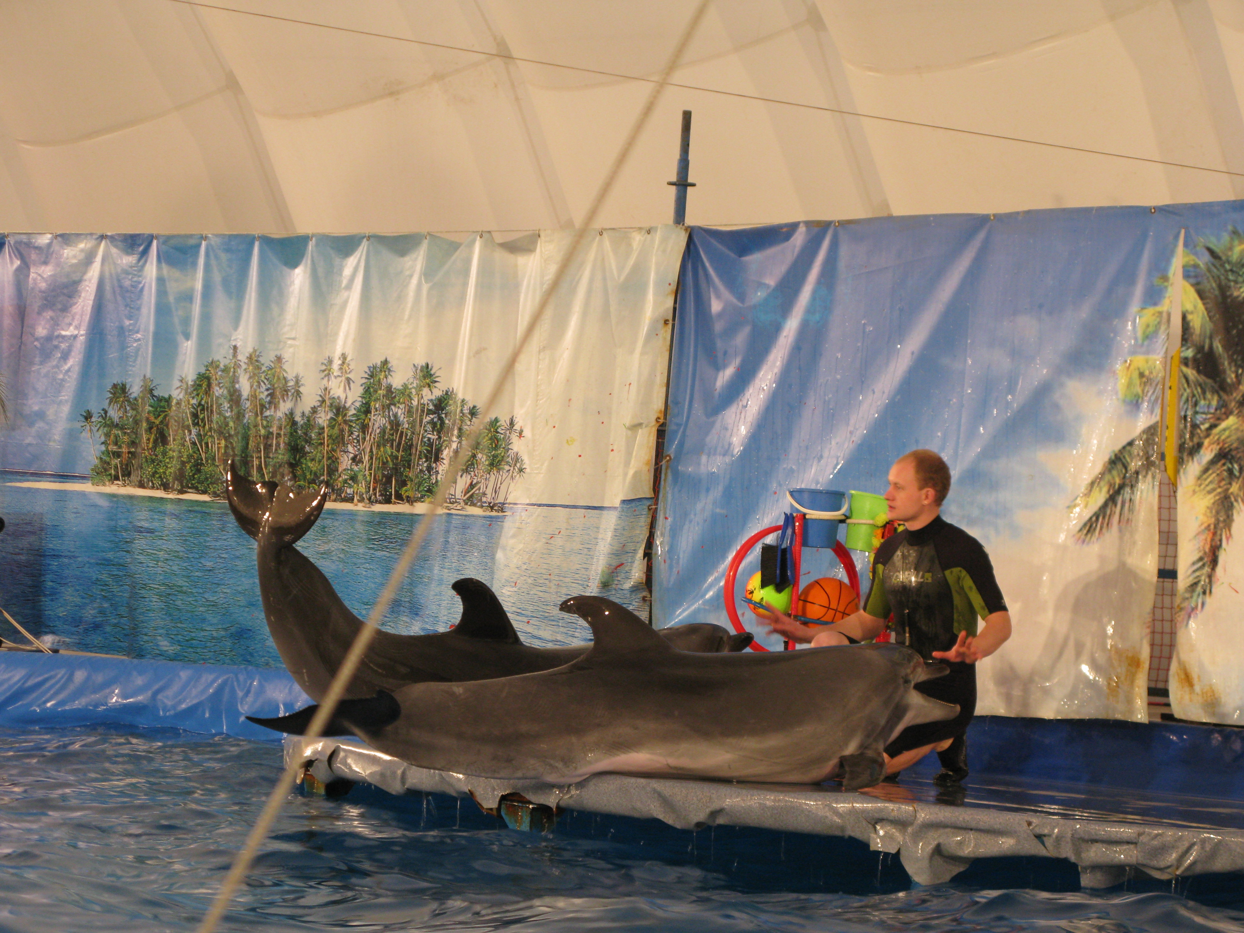 Grands dauphins (tursiops truncatus) et leur dresseur, dans un delphinarium temporaire près de la statue de Kurchatov, à Cheljabinsk.